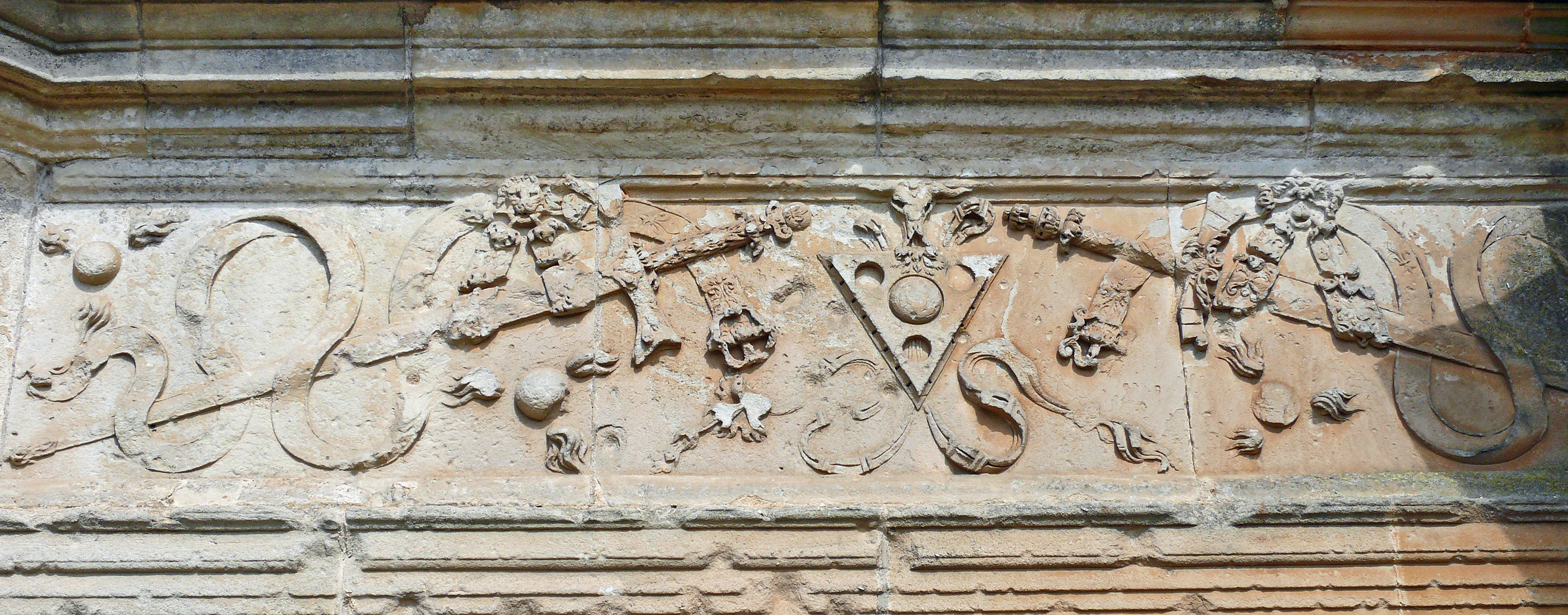 Assier - Frise sculptée de l'église Saint-Pierre - Armes de Grand écuyer de France